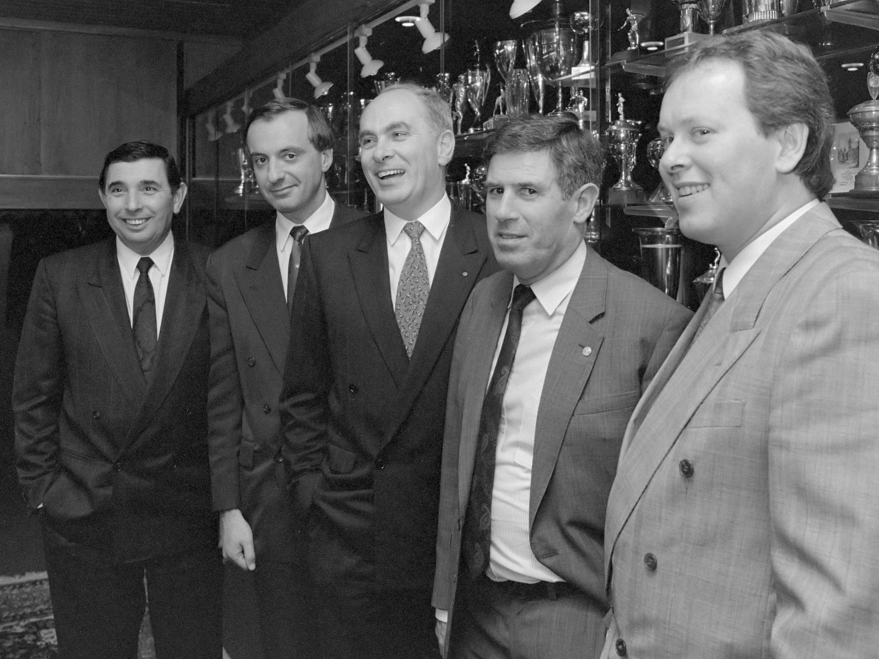 Ledenraad van Ajax kiest nieuw clubbestuur. Van links naar rechts Arie van Os (financiën), Uri Coronel (commercie), Michael van Praag (voorzitter), André Kraan (technische zaken) en Hennie Henrichs (amateurs) 19 januari 1989